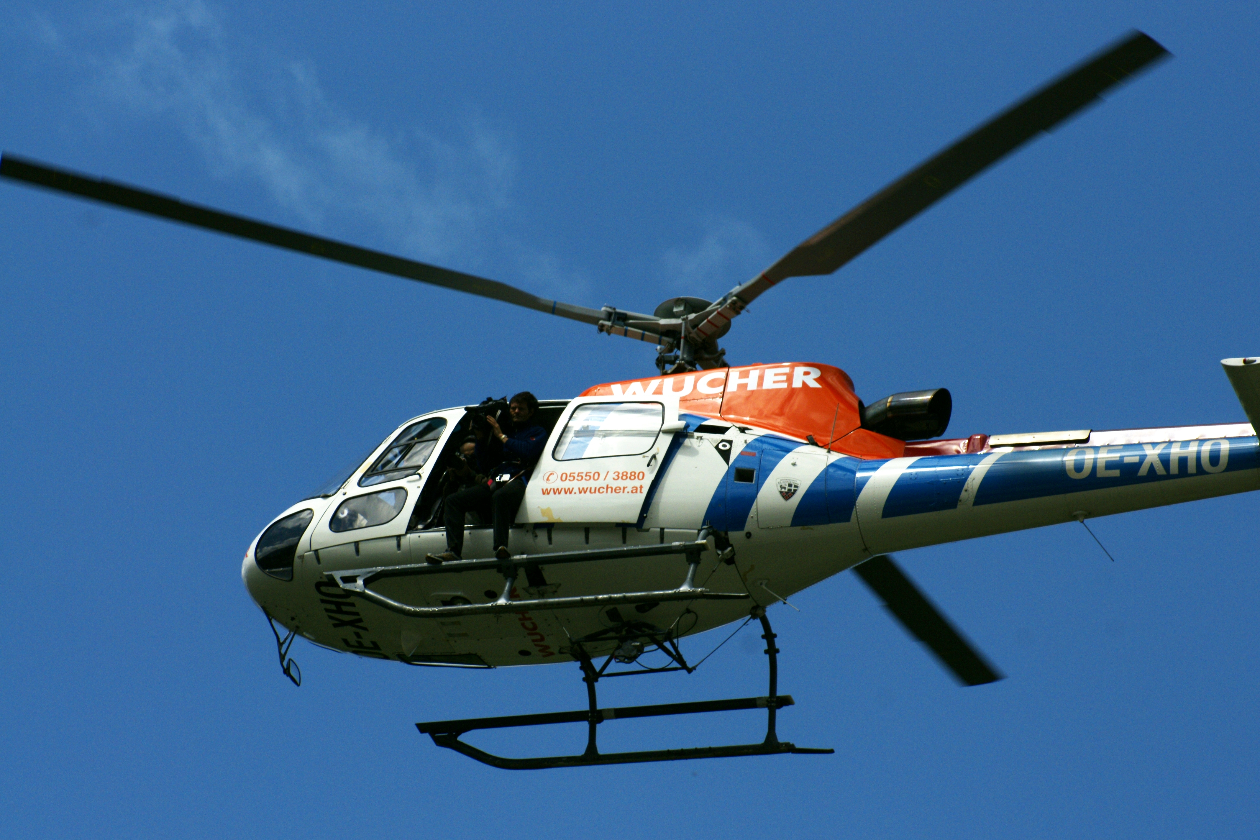 Ein Eurocopter AS 350 Ecureuil B3 der Eurocopter Group bei Dreharbeiten zur Outdoortrophy 2008 in Andelsbuch.